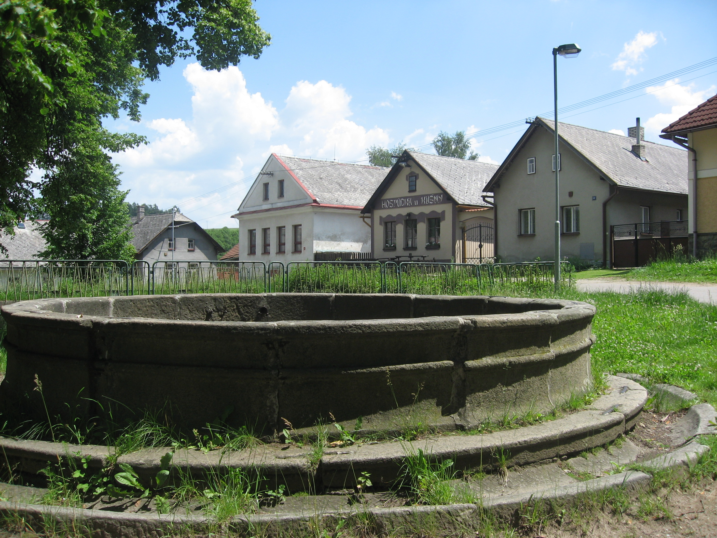 Úsobí